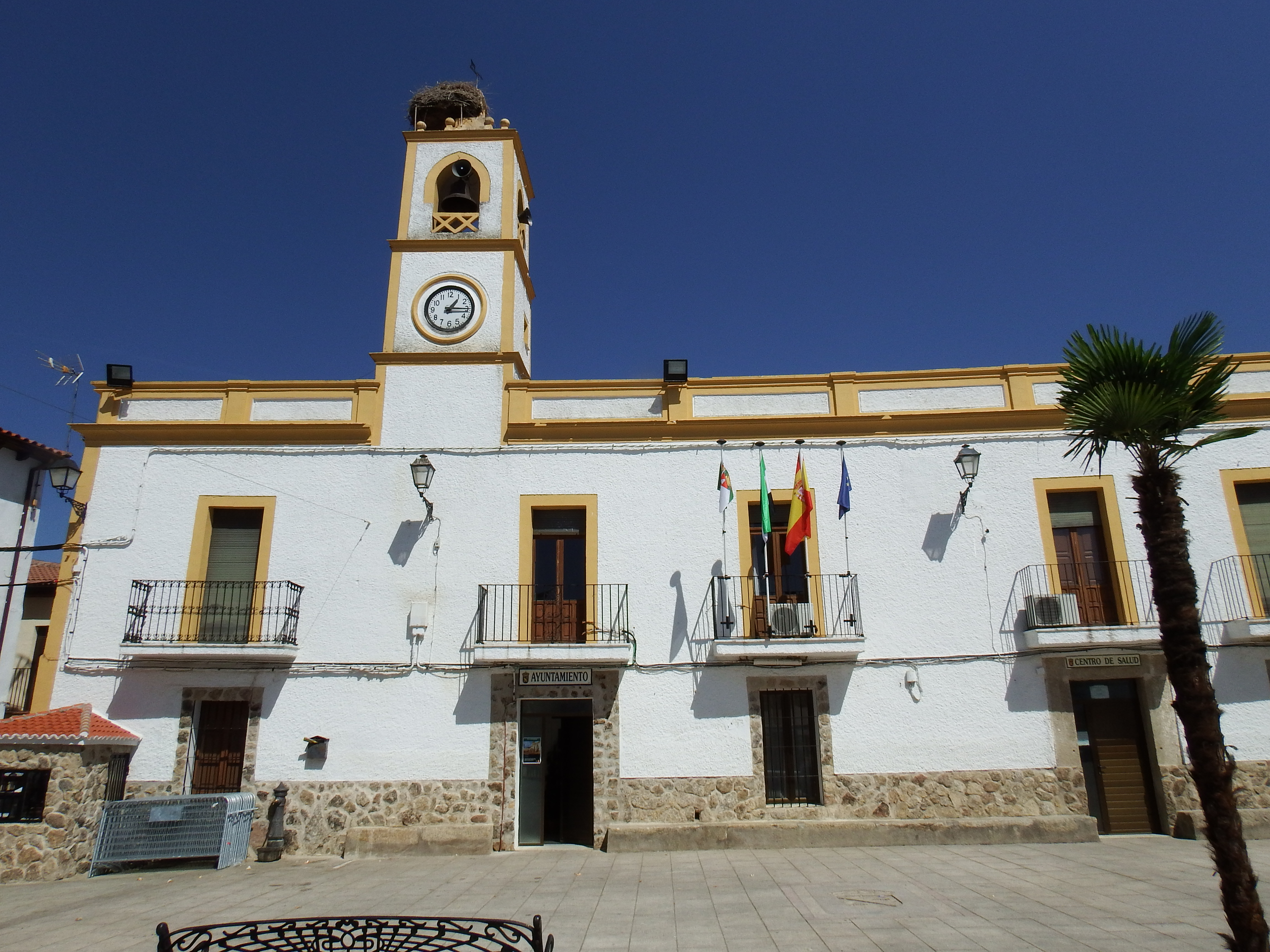 La Cumbre